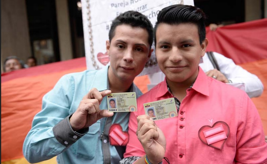 Segunda pareja Gay en registrar unión de hecho en Ecuador - Javier vallejo y Xavier Sanchez